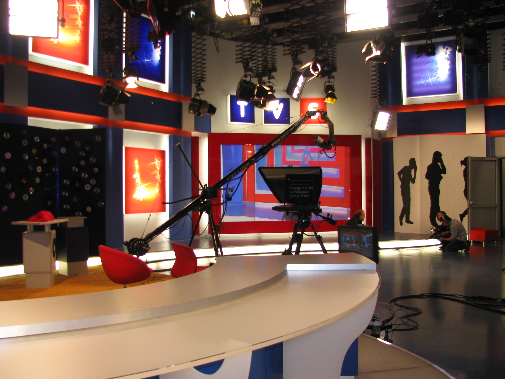 Studio TVS